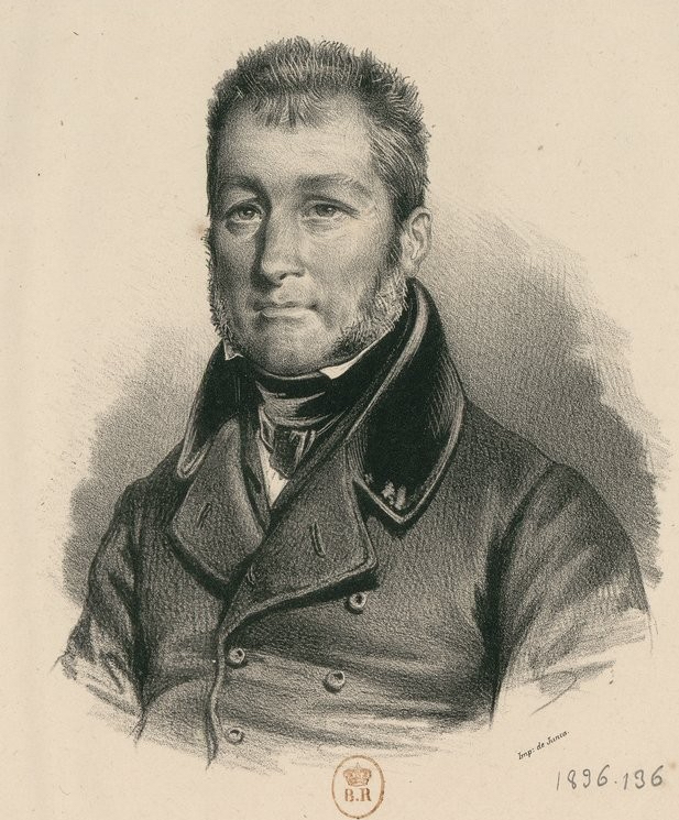 Audry de Puyraveau.